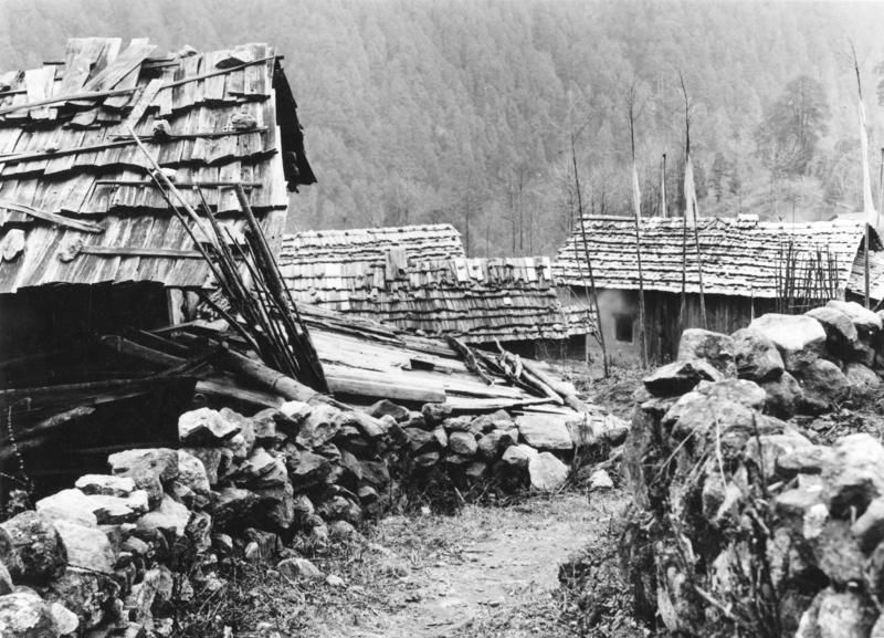 Tibetexpedition, Lachen, Dorf Lachen